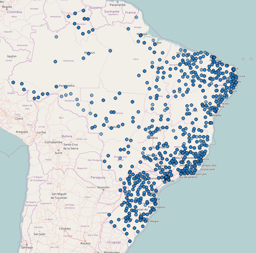 Mapa do Brasil com todos os polos da Universidade Aberta do Brasil - UAB (2016)